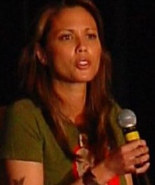 Lexa Doig